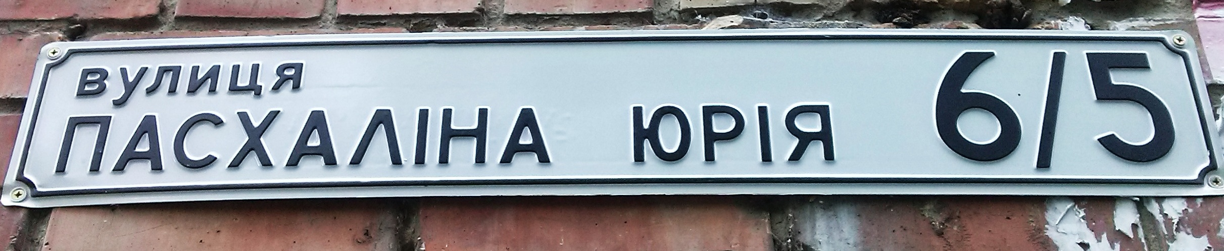 табличка на доме улицы Юрия Пасхалина (до 2016 - ул. Ильича) , Киев.